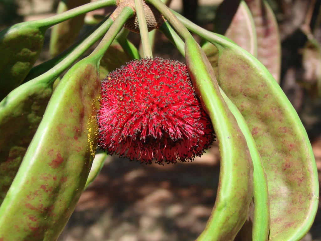 Parkia platycephala - FABACEAE Brasília - Distrito Federal - Brasil.